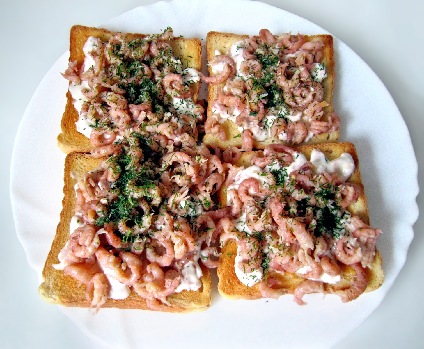 Krabbentoast mit Dill, ein typisch Hamburger Snack